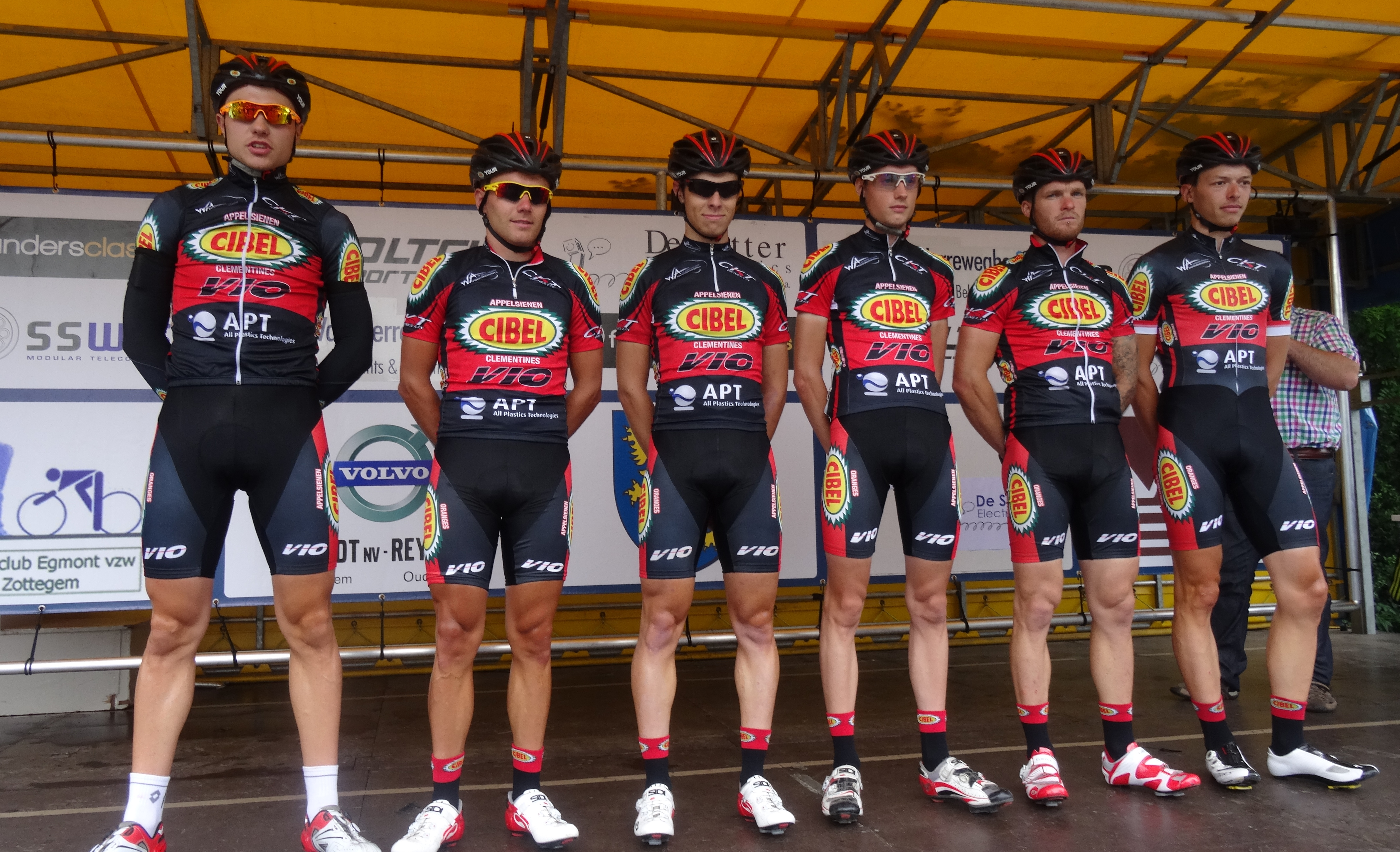 Reportage photographique réalisé le samedi 5 juillet à l'occasion du départ et de l'arrivée du Circuit Het Nieuwsblad espoirs 2014 à Grotenberge (Zottegem), Belgique.